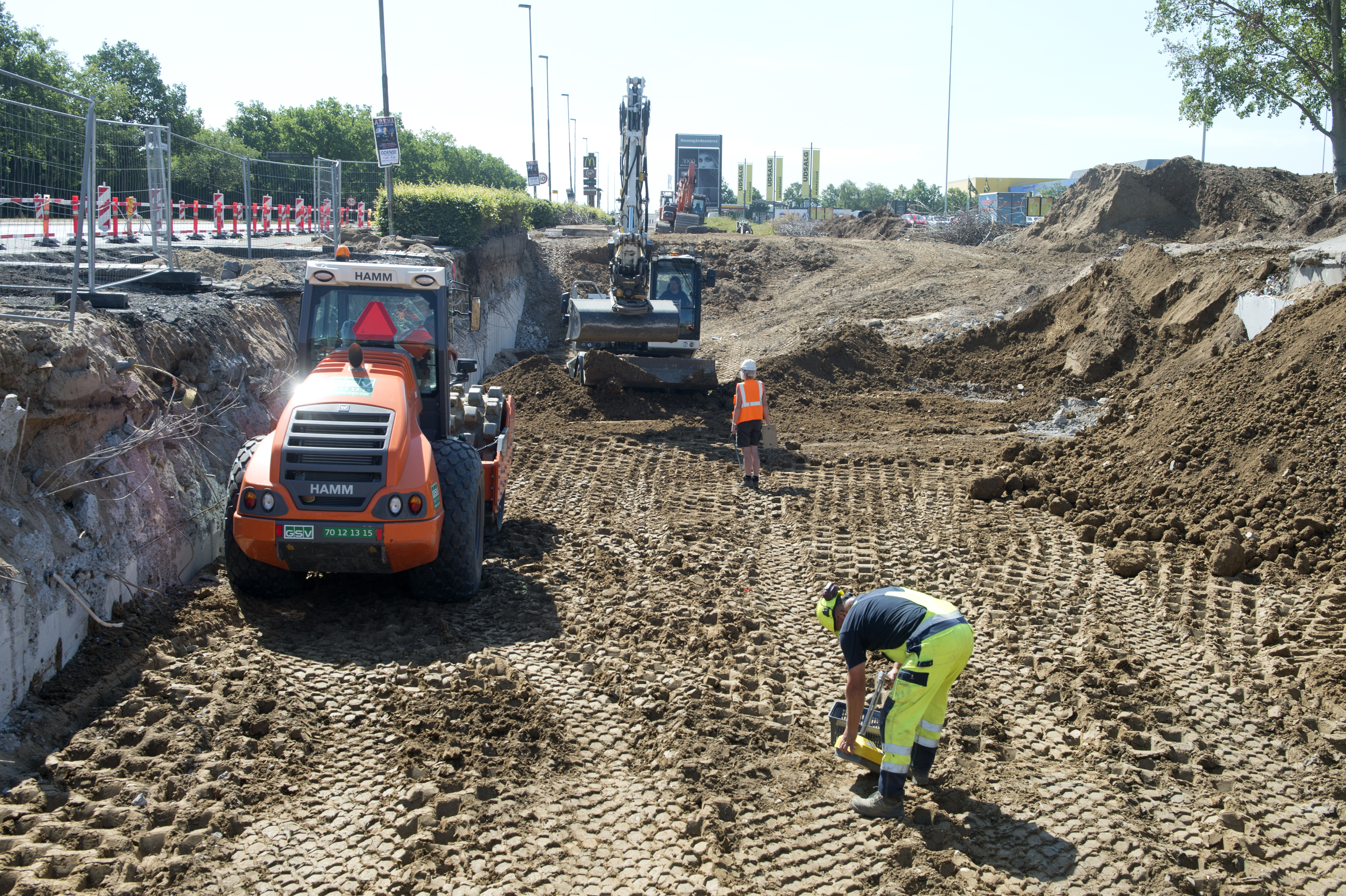 Opfyldning af viadukt ved Rosengårdcentret